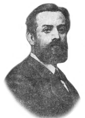 Manuel Antonio Caro (Valparaíso 1835 - †1903); pintor chileno, representante del realismo academicista.